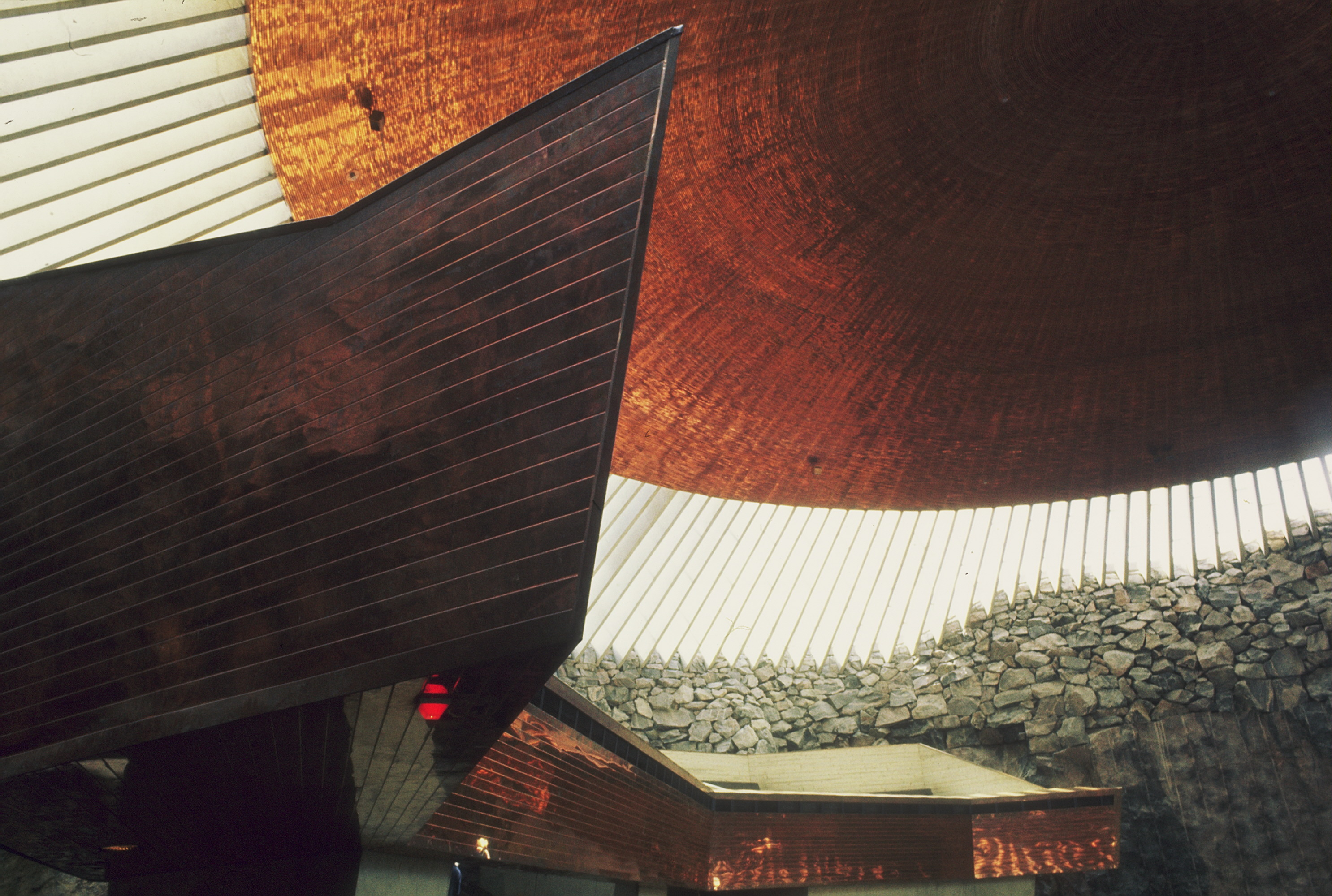 Temppeliaukion kirkko. Lehterin itäpää. Helsinki, Finland